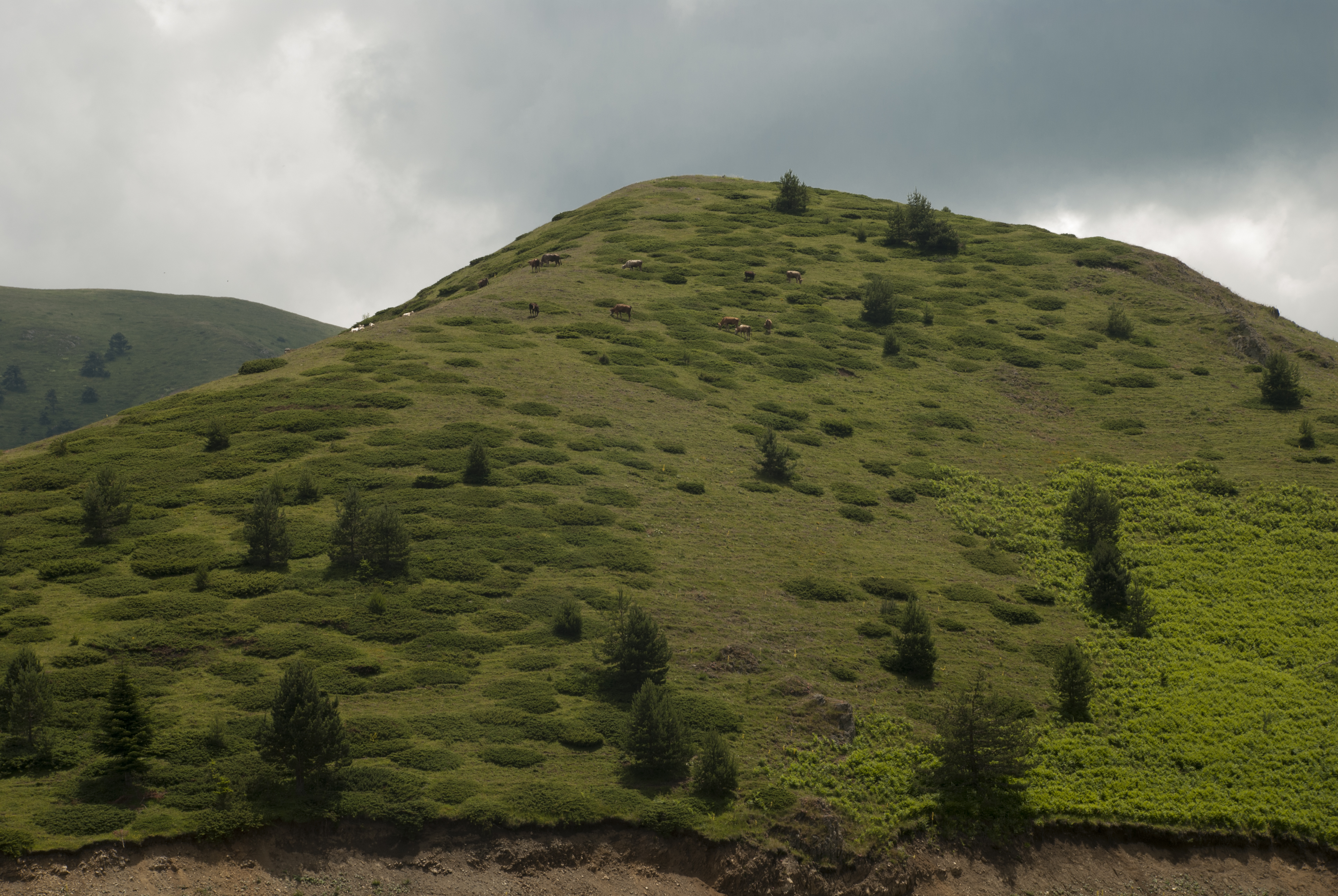 Yedigöller yolu yayla, mera, otlak